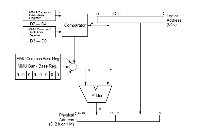 Z180-MMU